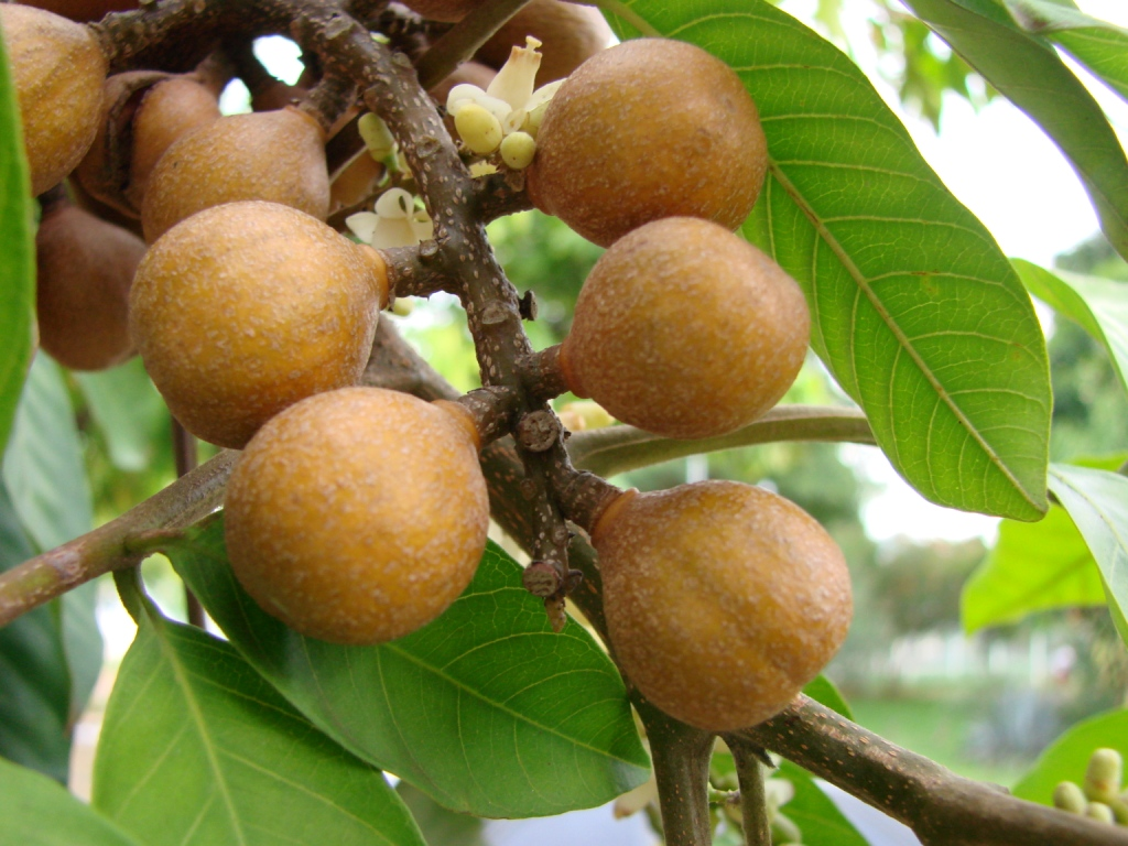 Guarea guidonia - MELIACEAE Brasília - Distrito Federal - Brasil.